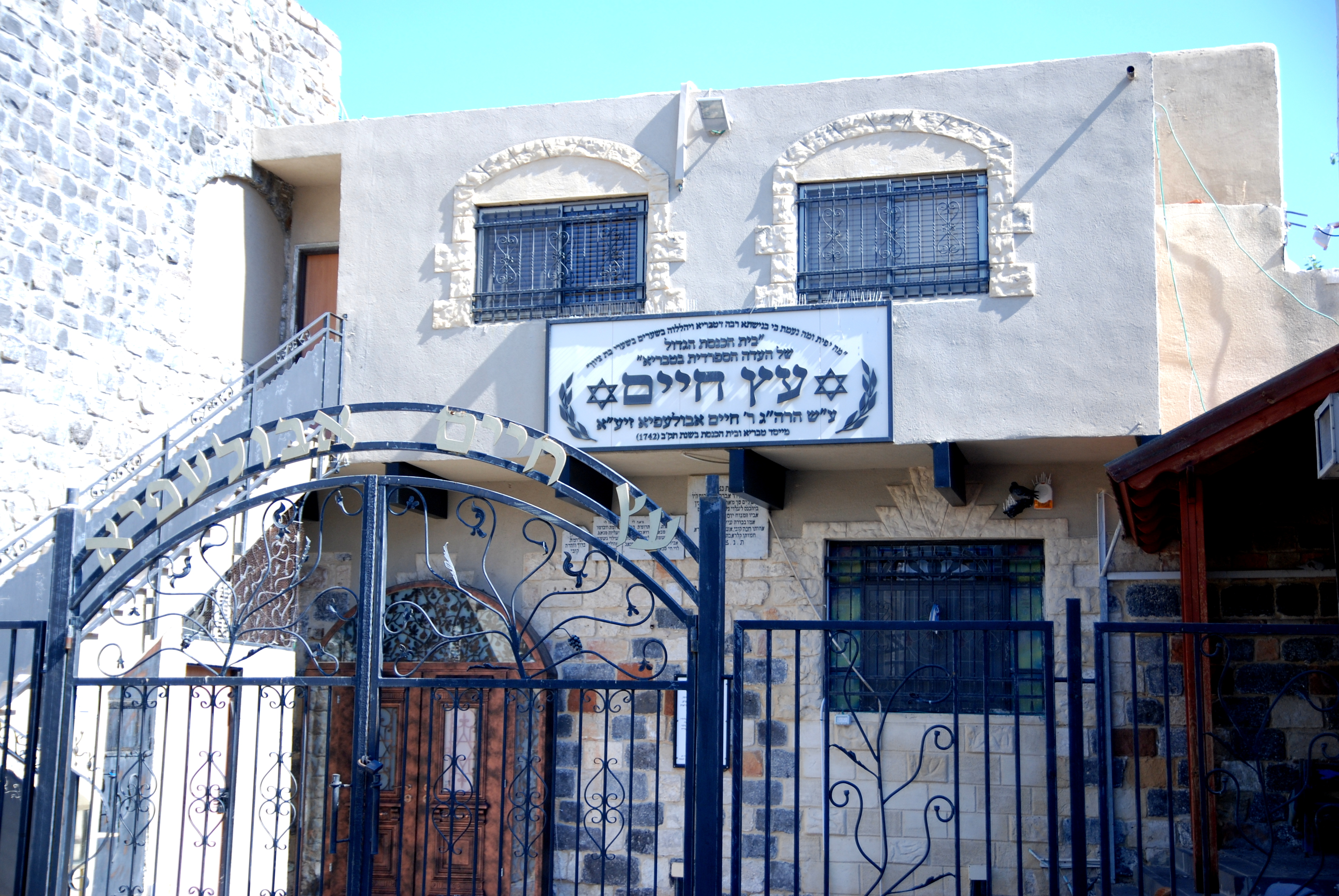 חצר היהודים בטבריה הוא מתחם בלב המדרחוב (בסמיכת ל"גן הבנים") בו נמצאים מספר בתי כנסת, חלקם פעילים, בהם בית הכנסת העתיק (תקצ"ז-1836), בית הכנסת עץ החיים, בית הכנסת של חסידי קרלין ובית הכנסת "הסניור". כן מצויה במקום אנדרטה לזכר בני טבריה שנפלו במערכות ישראל.